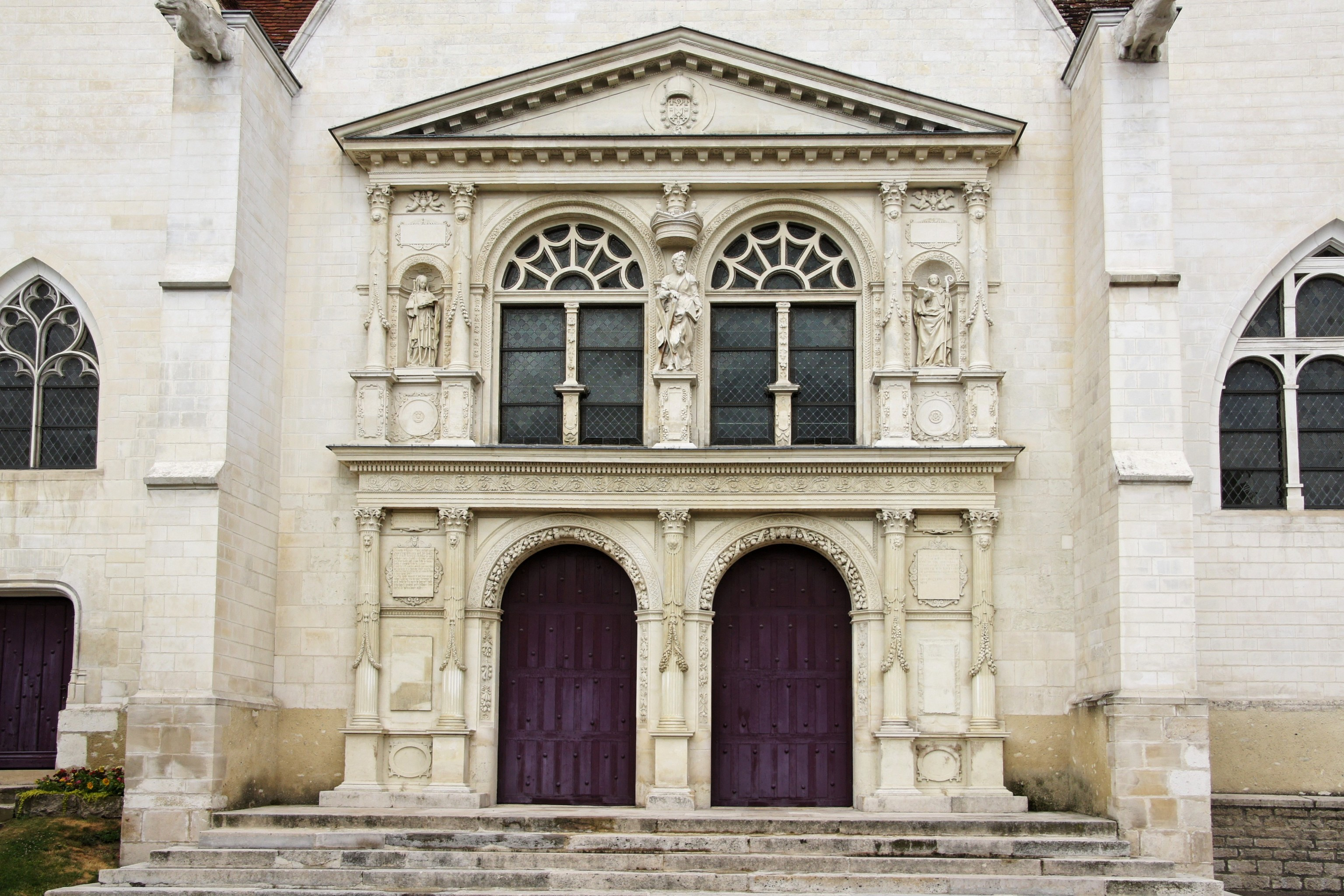 Les portes ornées de sculpture de l'église de Saint André Les Vergers (10)